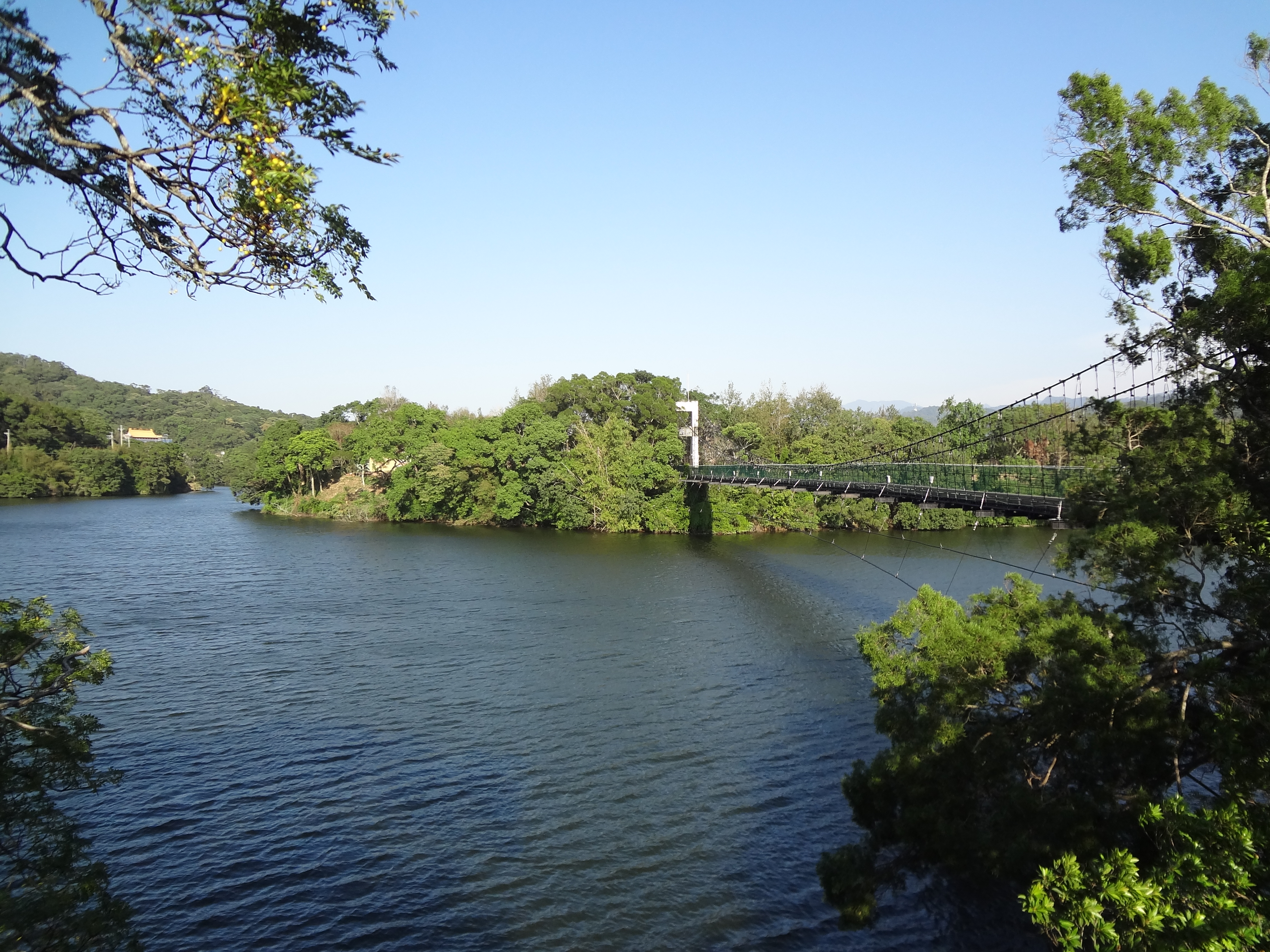 中文（台灣）: 臺灣苗栗縣頭屋鄉明德水庫壹號吊橋通往日新島。